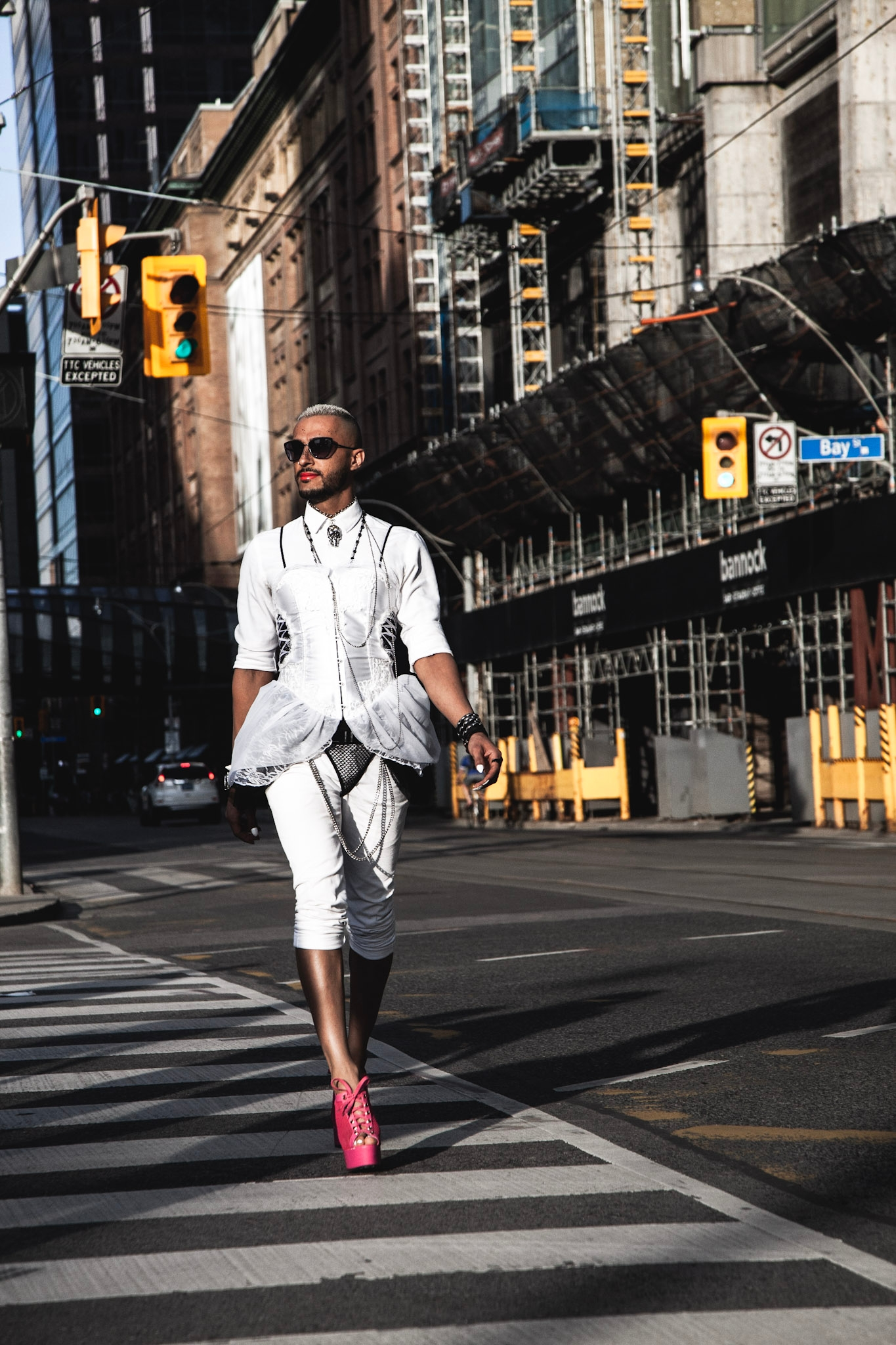 این عکس توسط پوریا افخمی در خیابان های تورنتو ثبت شده است.